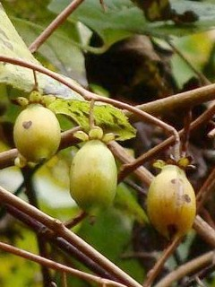 マタタビ 青森県大鰐町折紙